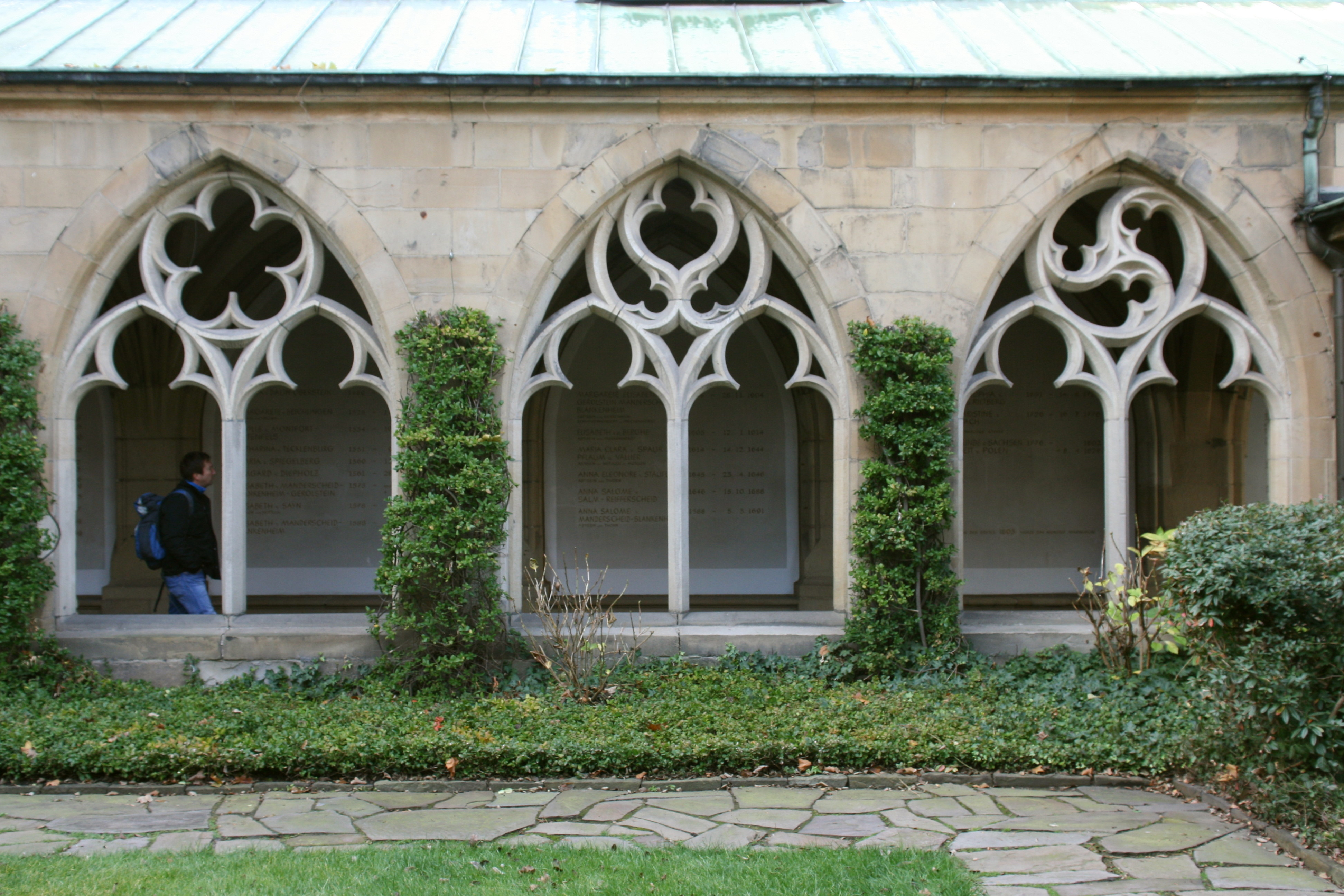 Kreuzgang des Münsters in Essen